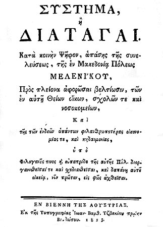 Мелнишка харта от 1913